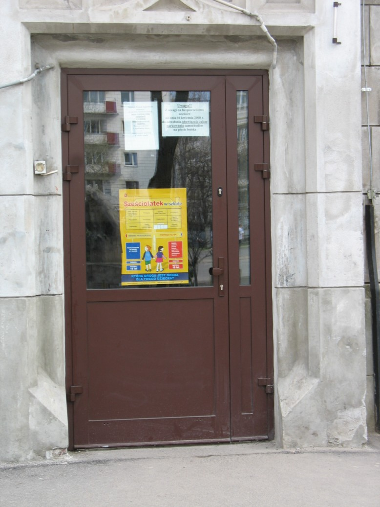 Enter 1